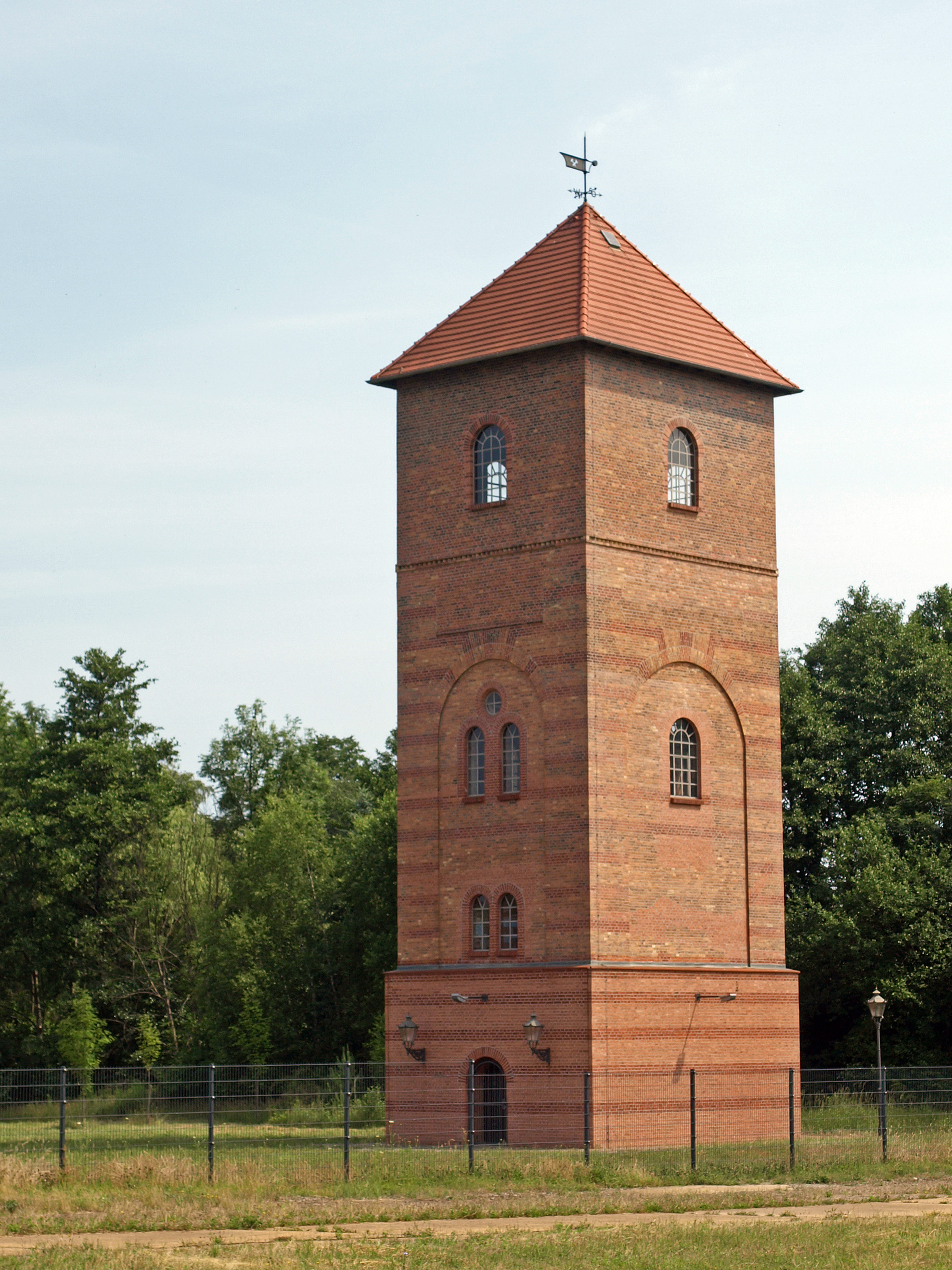 Wasserturm der Keulahütte in Krauschwitz, im Jahr 2006 wurde der alte Wasserturm zum Barbaraturm geweiht